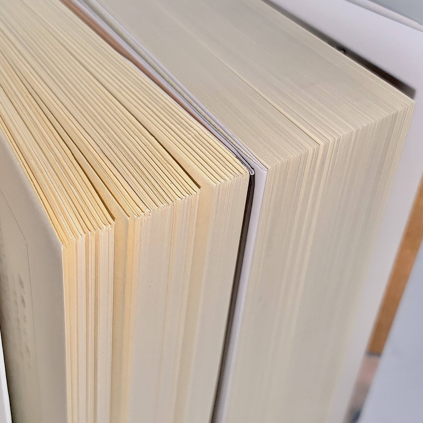 左:天アンカットで製本された文庫本（岩波文庫）右:三方裁ちによって製本された文庫本（講談社学術文庫）